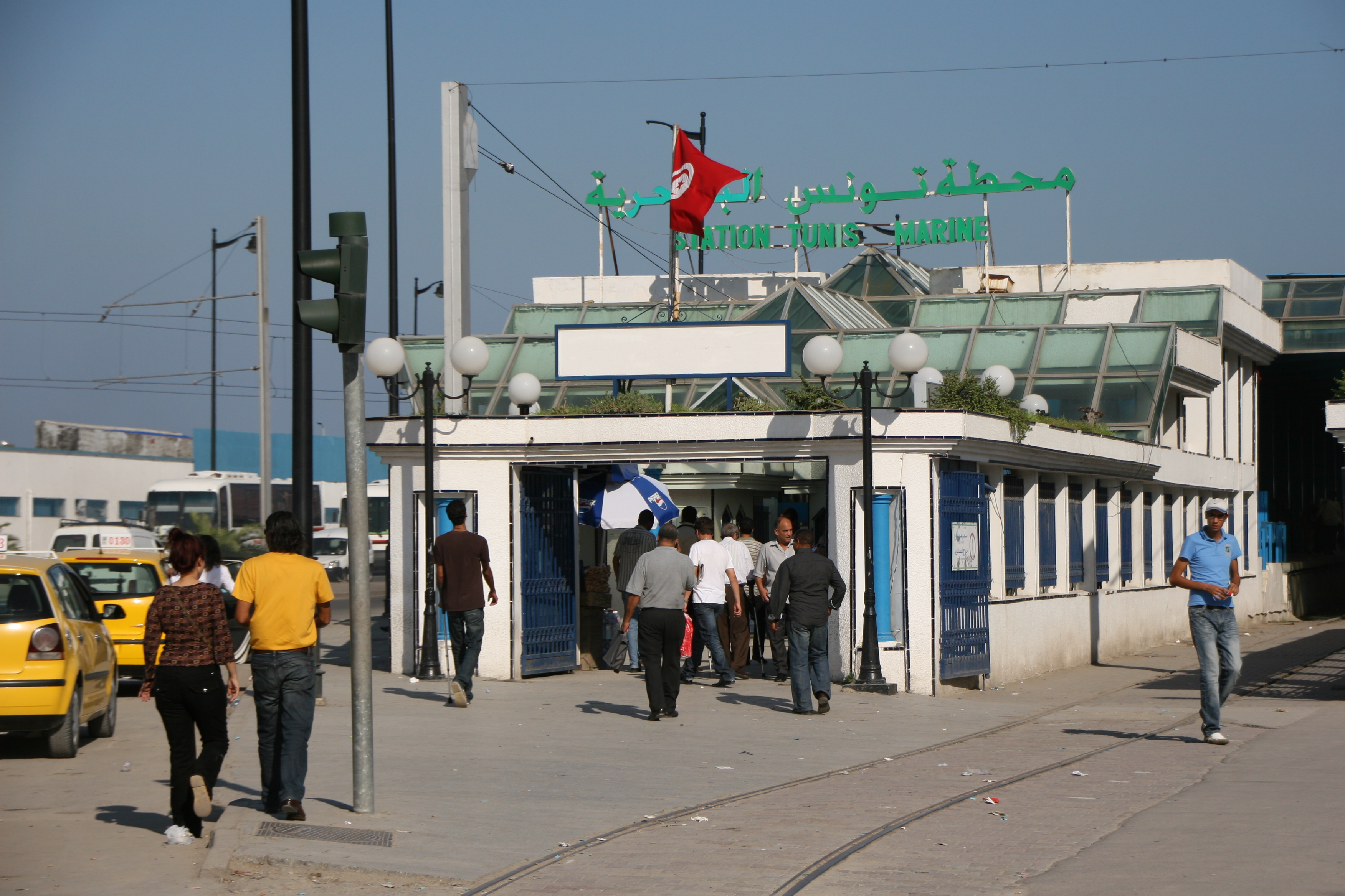 Station terminus de Tunis Marine (Tunis-Goulette-Marsa)